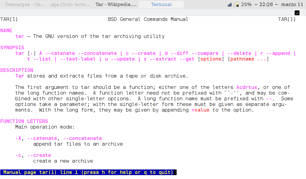 Captura de pantalla del manual de tar en GNU/Linux